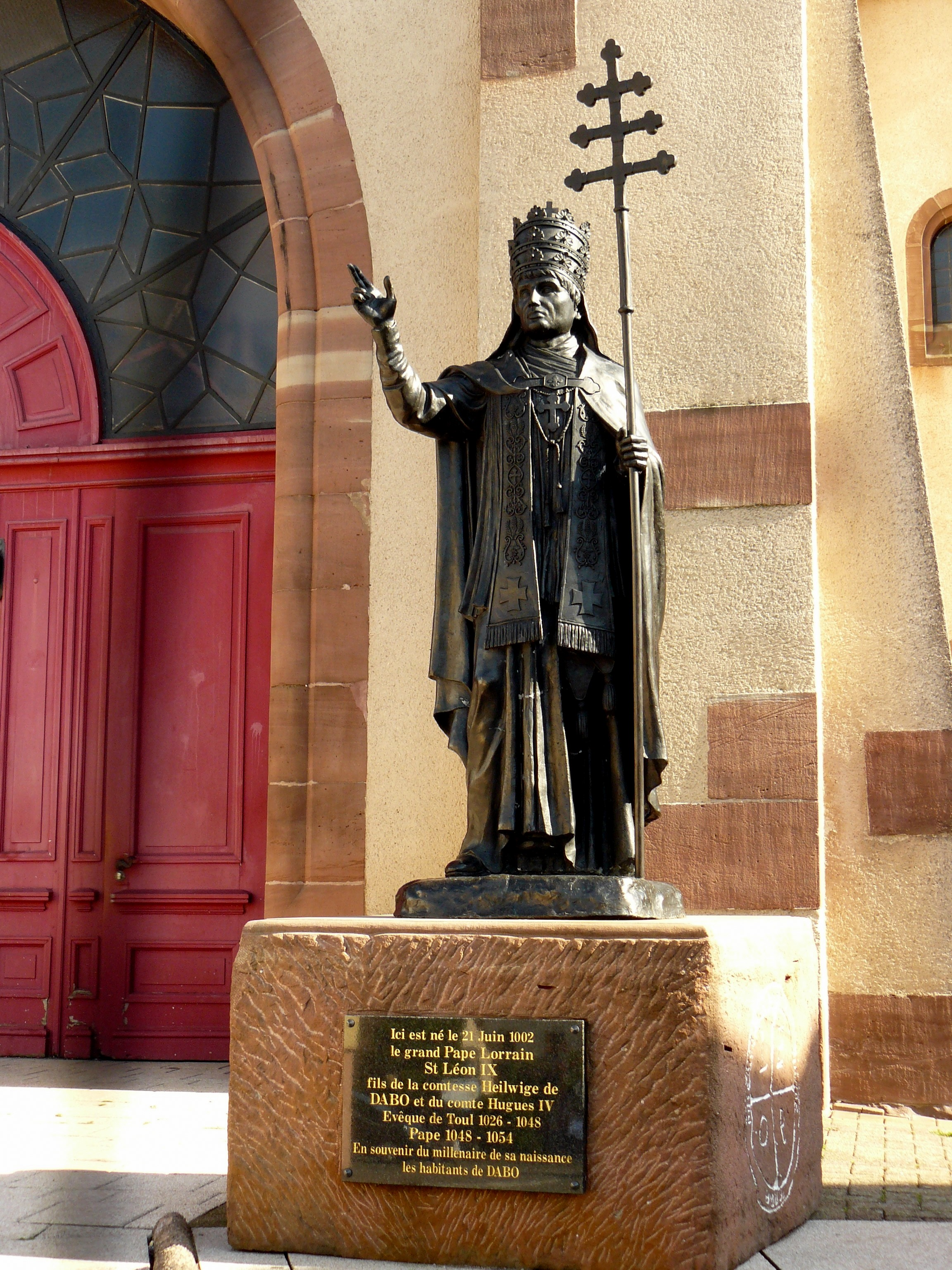 Statue du pape Léon IX à Dabo (Moselle, France)